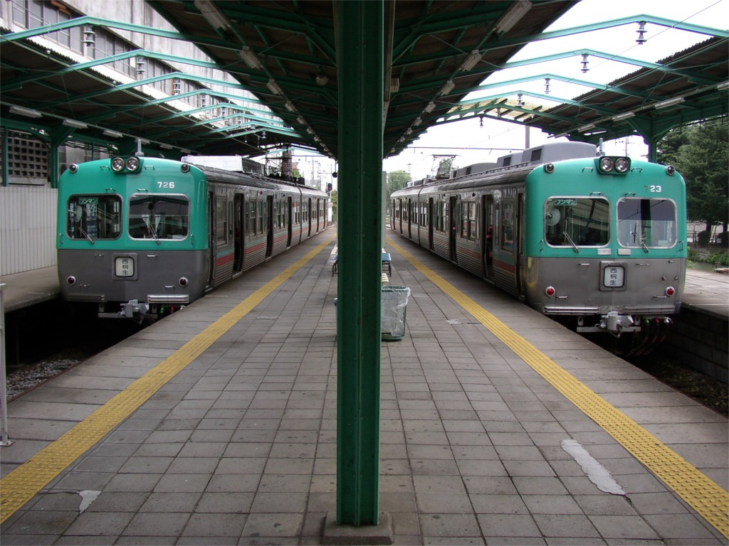 Chuo-maebashi station